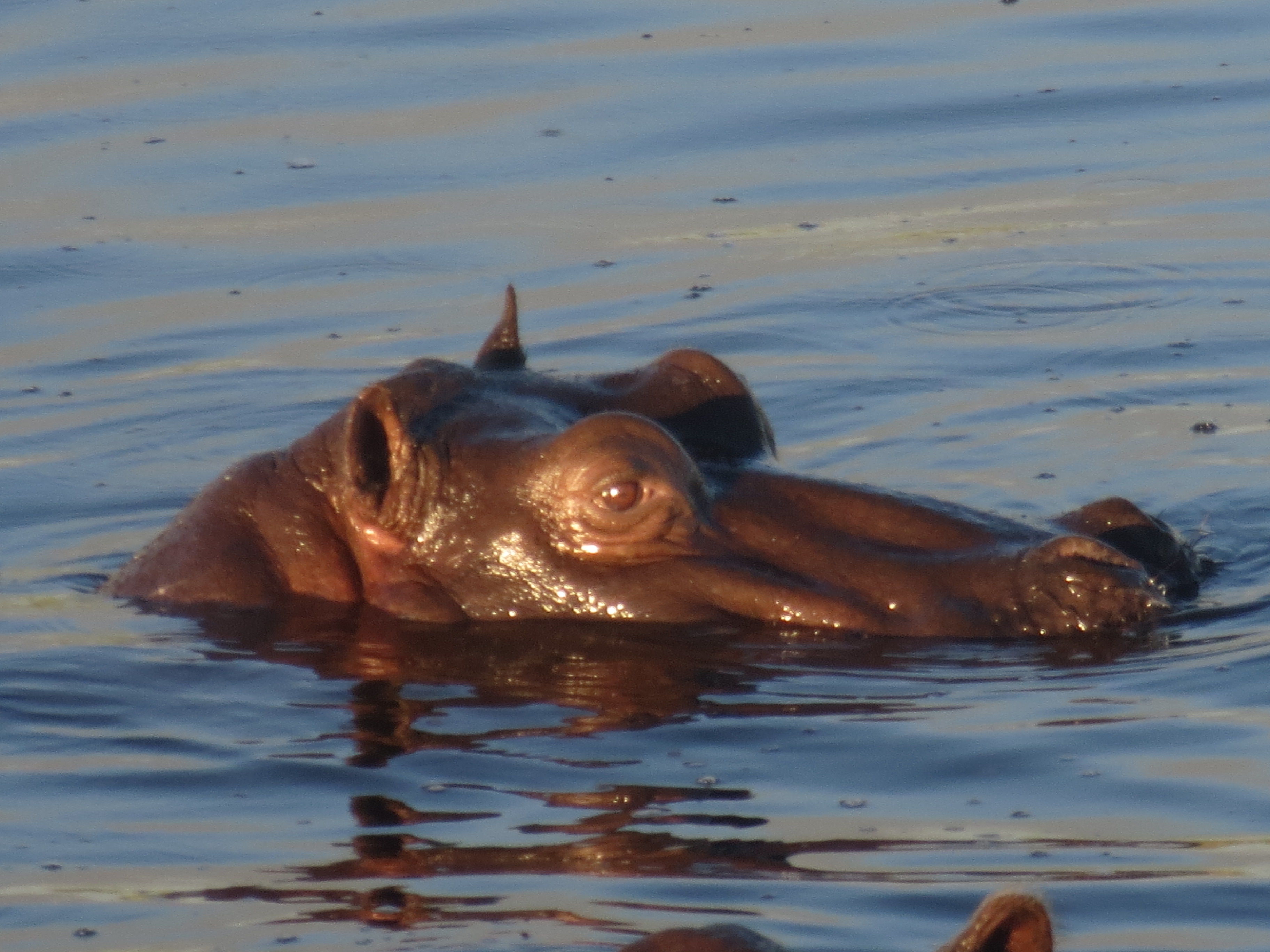 Botswana, June 2013.